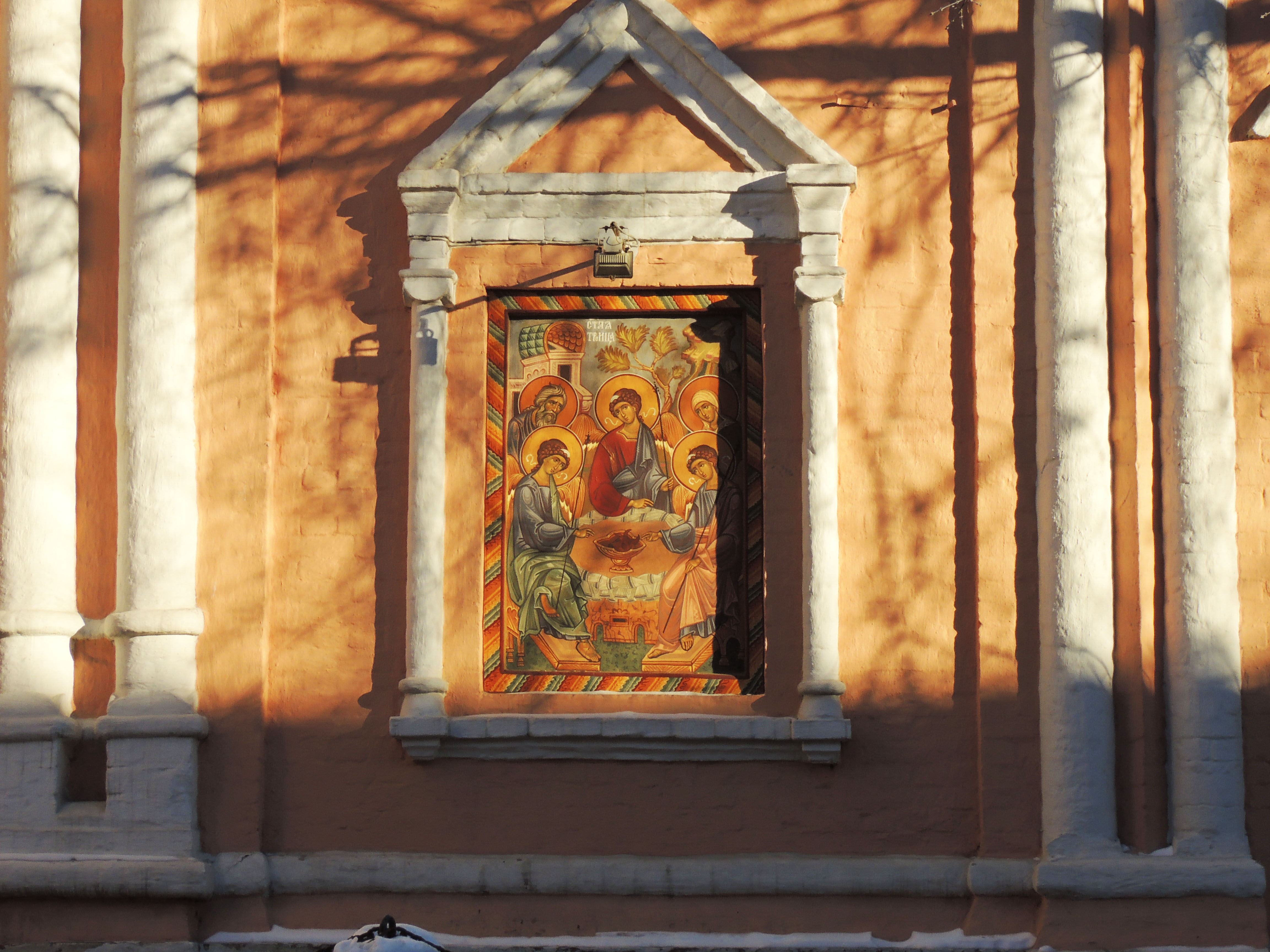 Икона Святой Троицы на наружной стене Храма Троицы Живоначальной в Хохлах, г. Москва, Россия